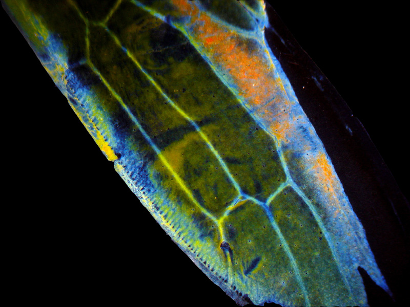 Glanzkäfer, 100x, Dunkelfeld